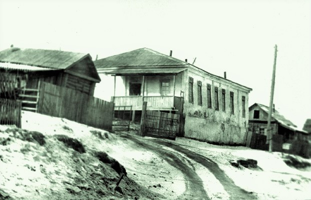 Impianto di Nerčinsk. L'ospedale dei detenuti nel XIX secolo